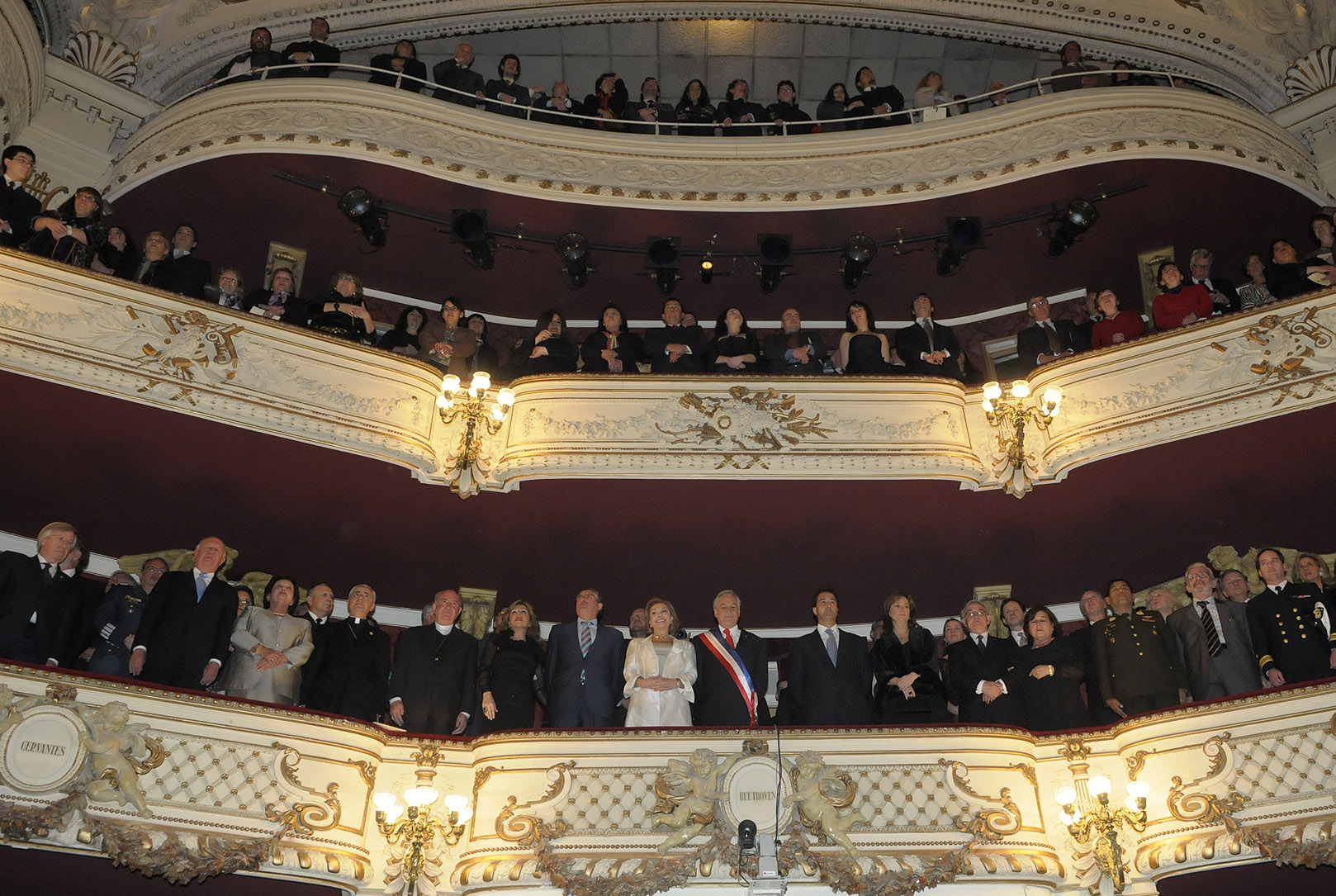 La Función de Gala de Fiestas Patrias, como parte de las celebraciones del Bicentenario del país, tuvo lugar en el Teatro Municipal de Santiago. Hasta ahí llegó el Presidente de la República, Sebastián Piñera, acompañado por su esposa, Cecilia Morel, y las principales autoridades del país para presenciar la ópera “Rigoletto” de Giuseppe Verdi.